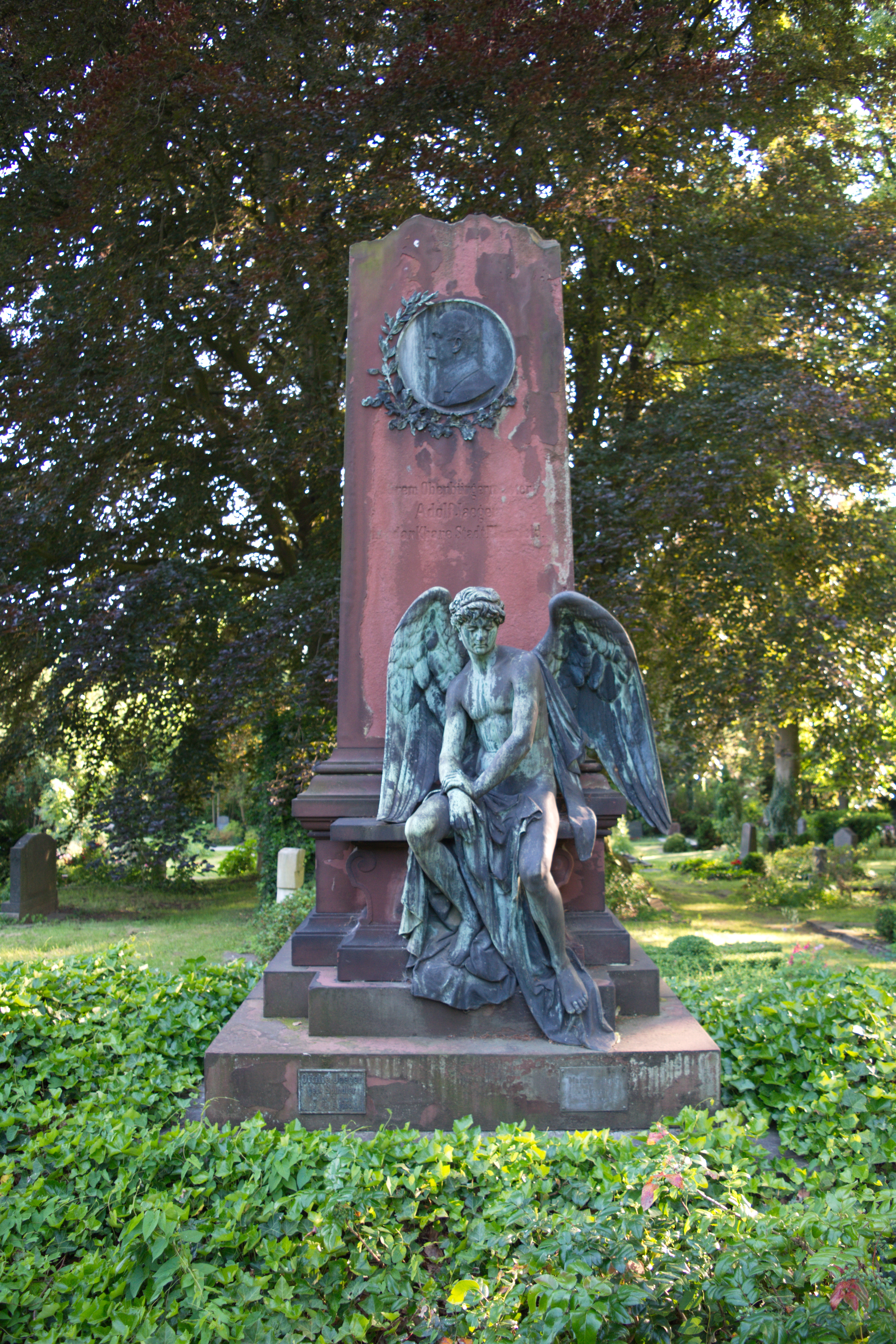 Hochstraße, Wuppertal